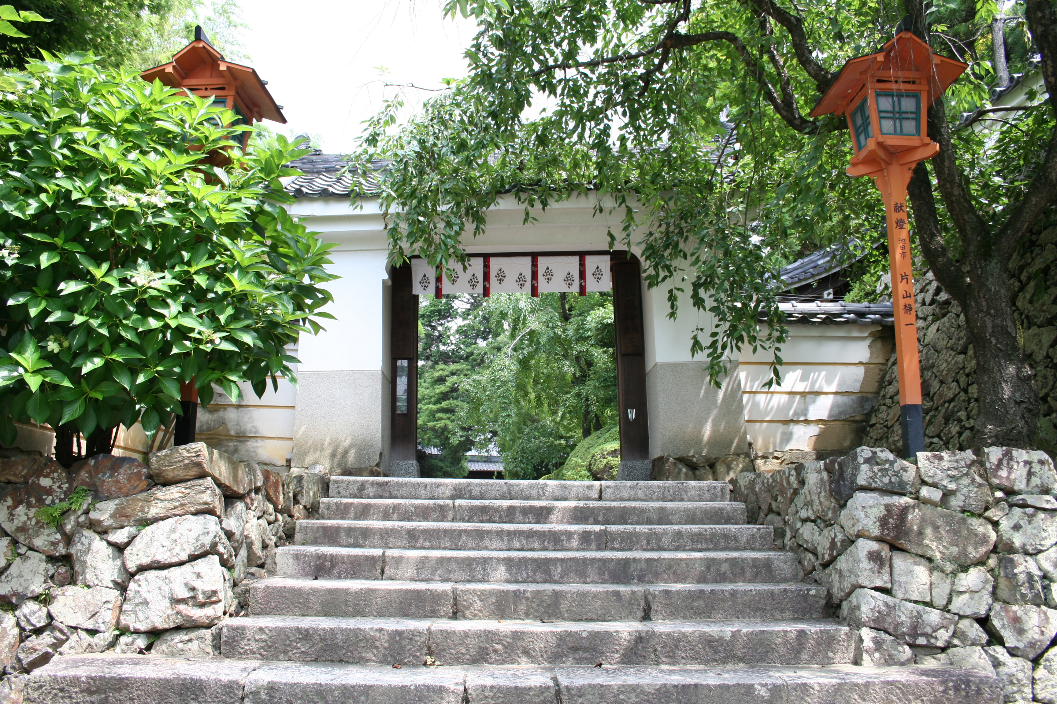 釈迦院 (池田市) 山門